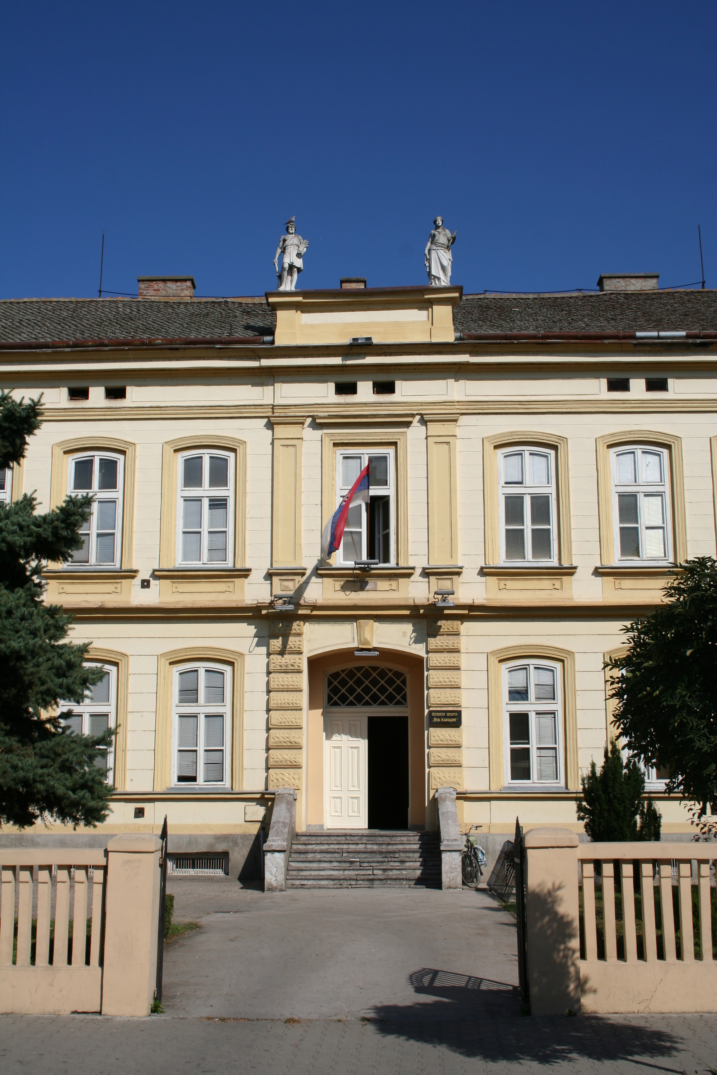 OŠ Vuk Karadžić, Šabac